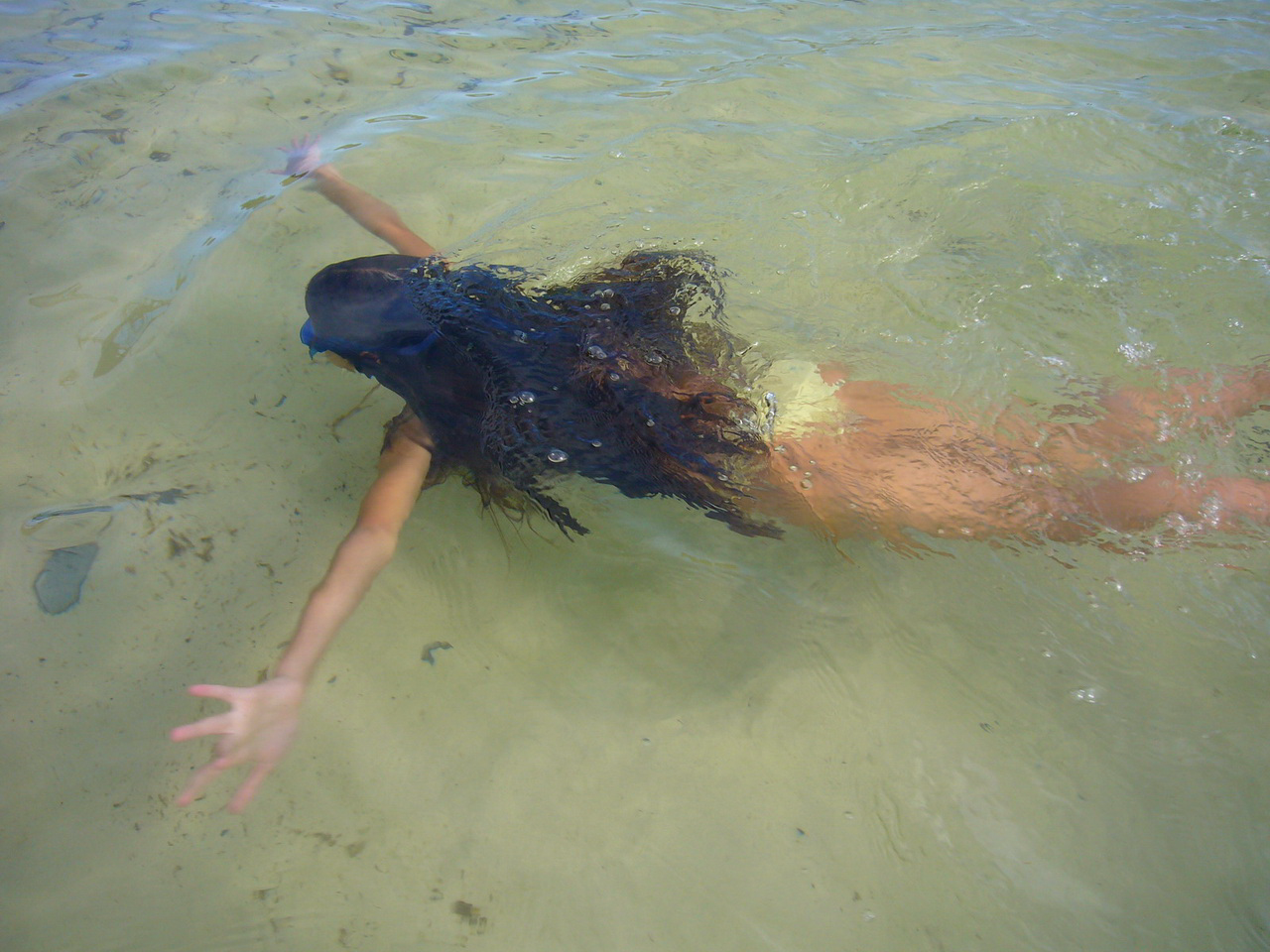 Fotos de los refugios y reservas de Itaipu, tomadas en los años 2007 y 2008 por mí